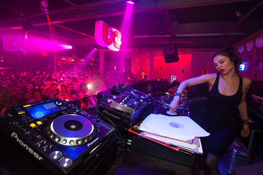 Space Ibiza Terraza